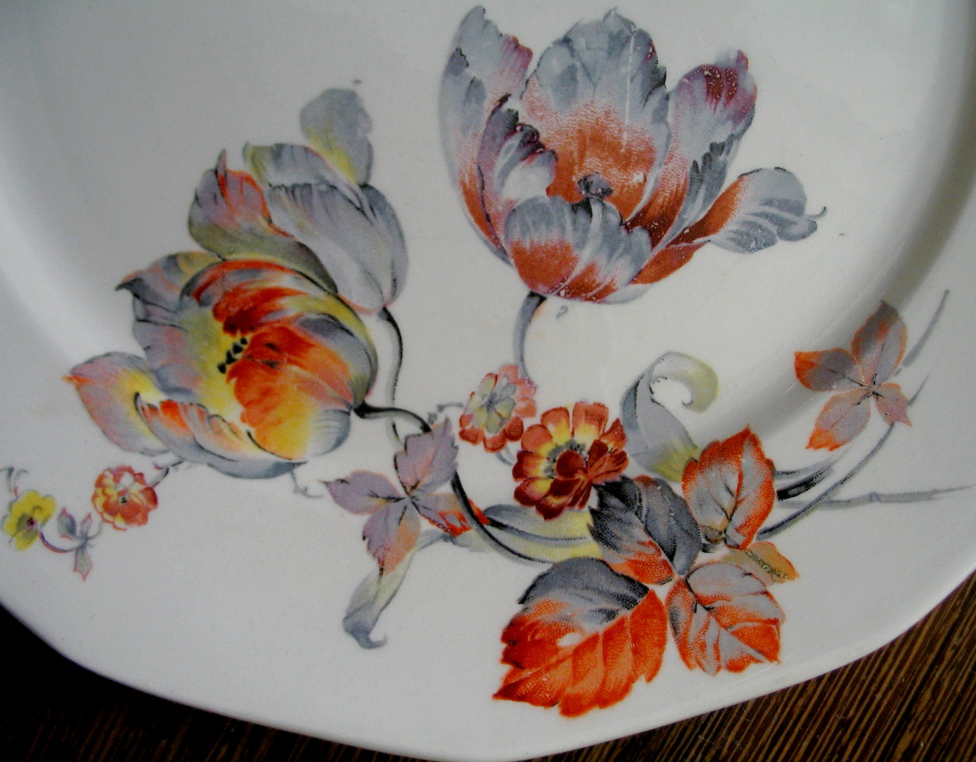 Assiette en faïence de Luneville, détail du décor Andilly.